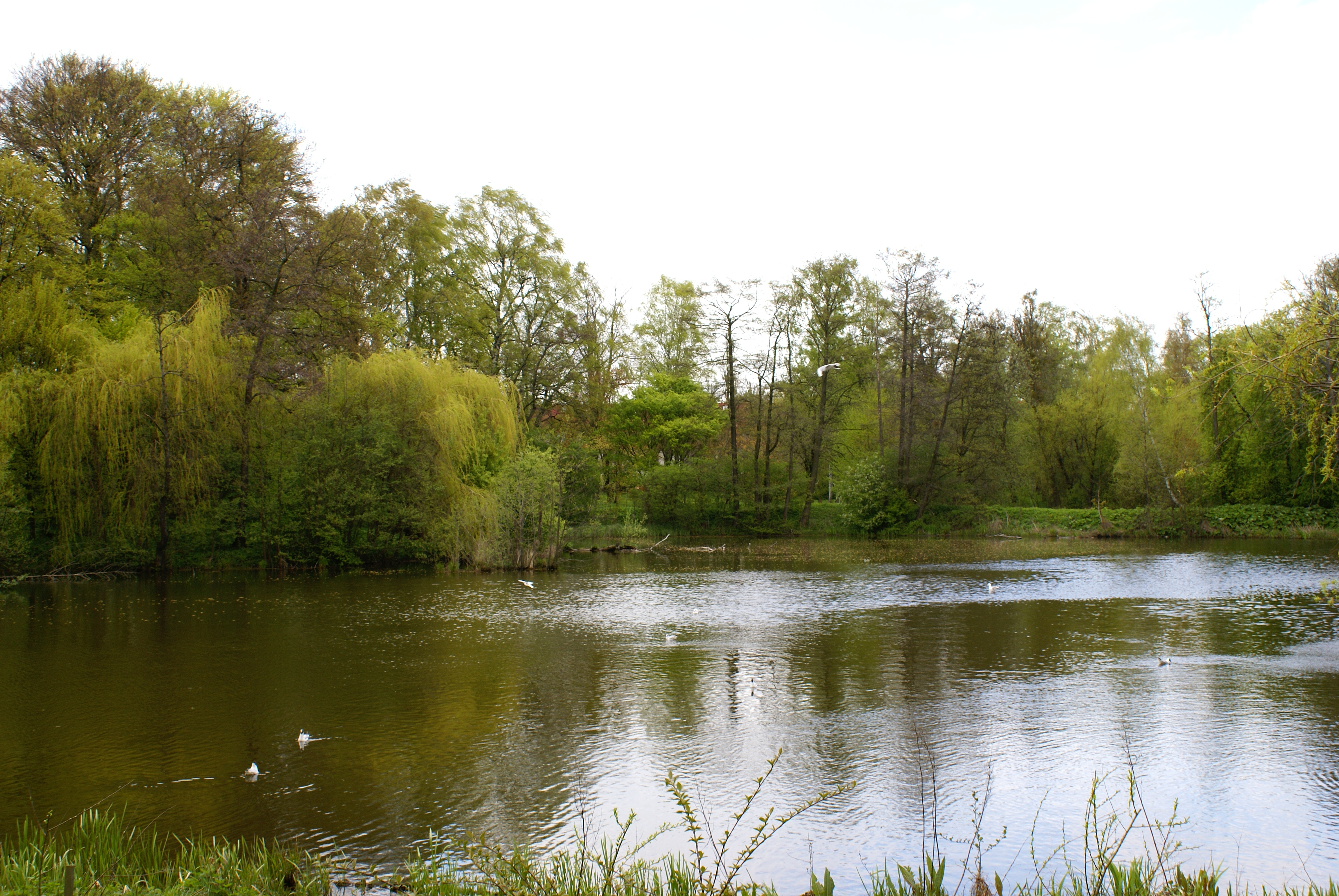 Ботанический сад Балтийского федерального университета имени Иммануила Канта, Калининград This image is related to the protected area of Russia number 3900050